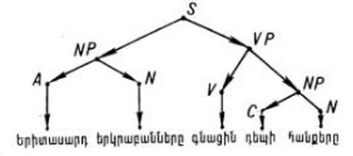 Գծագիր 3